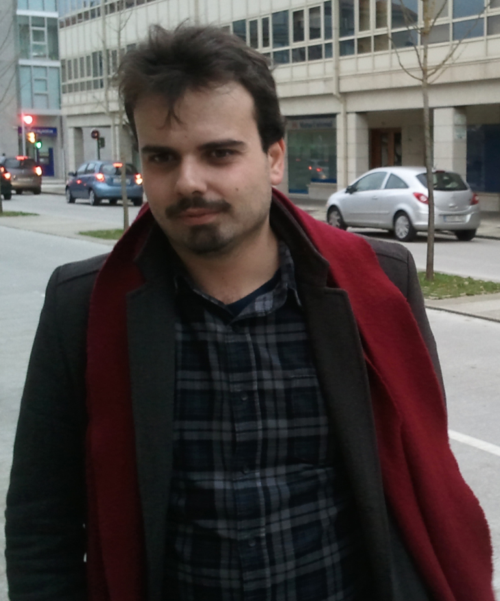 Alberto Ramos, escritor compostelán nunha entrevista no 2014.